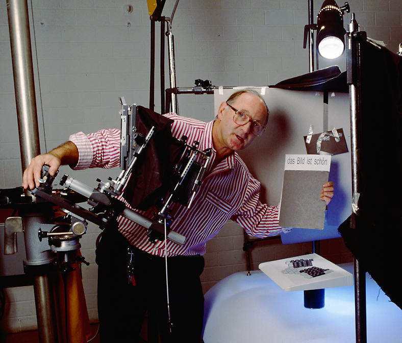 Gerhard Heisler bei der Arbeit im saarbrücker Fotostudio